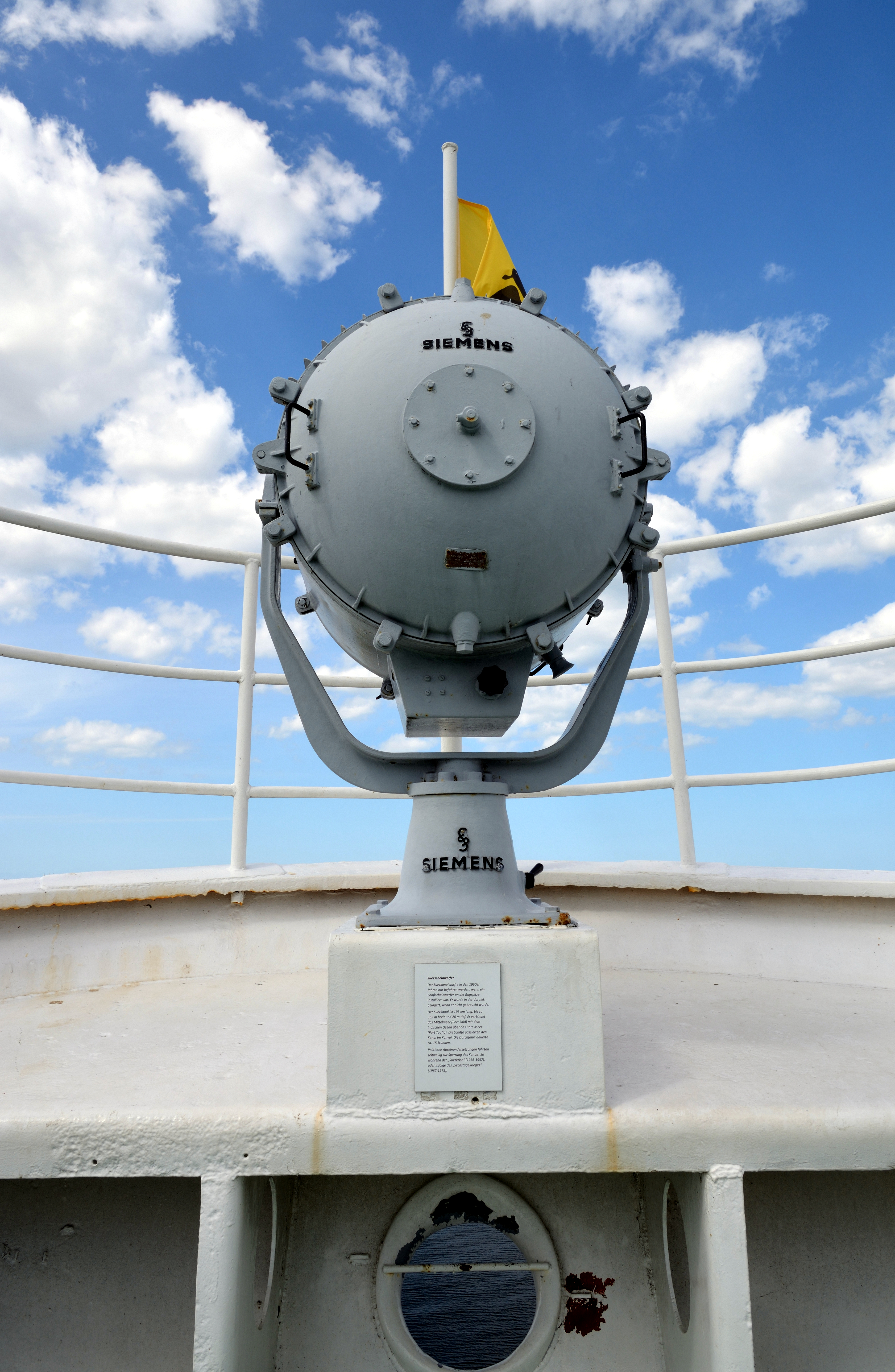 Ein Besuch auf dem Museumsschiff "Dresden" in Rostock im August 2019